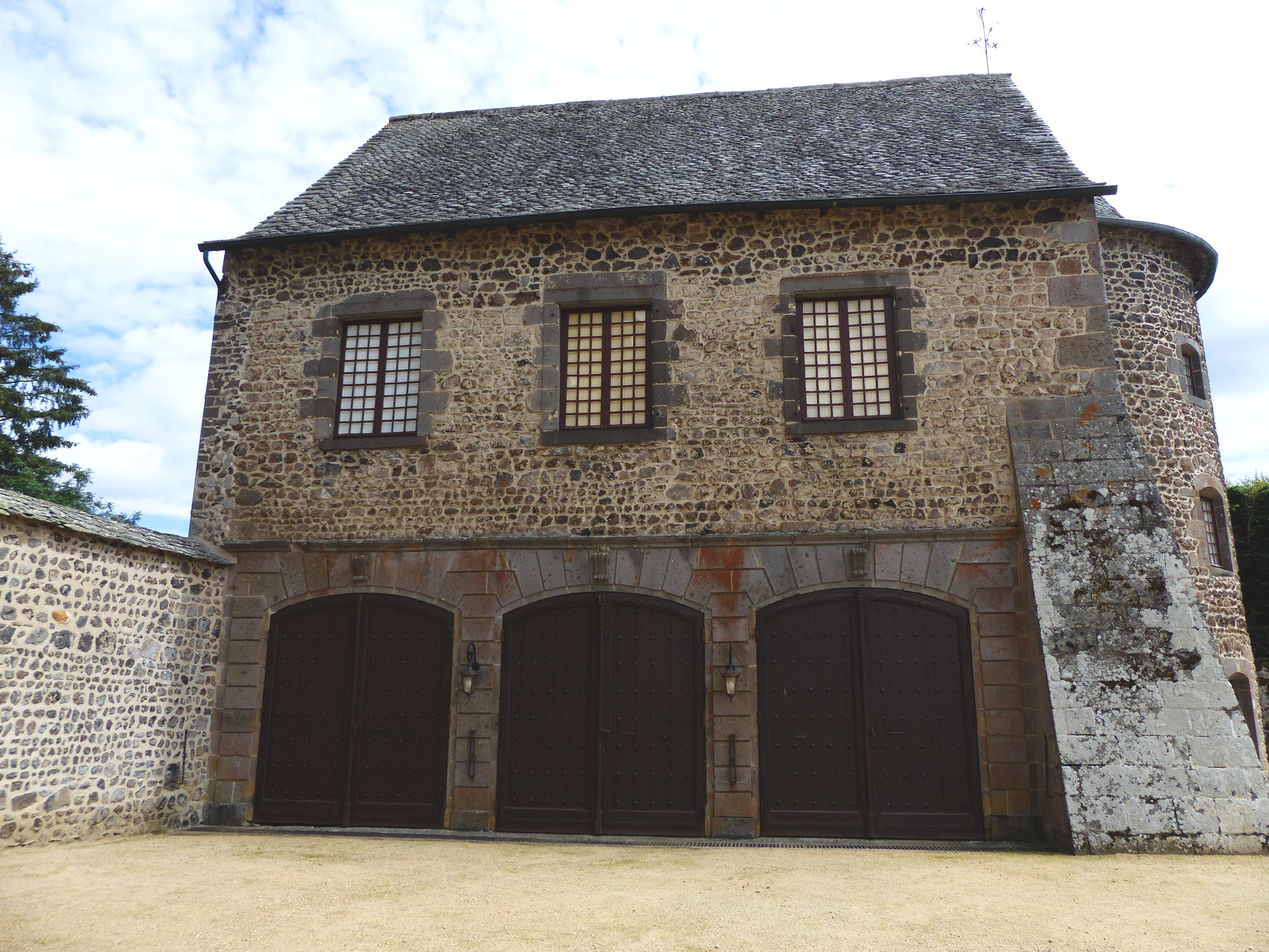 Château de Cordès à Orcival (Puy-de-Dôme, France). Garages.